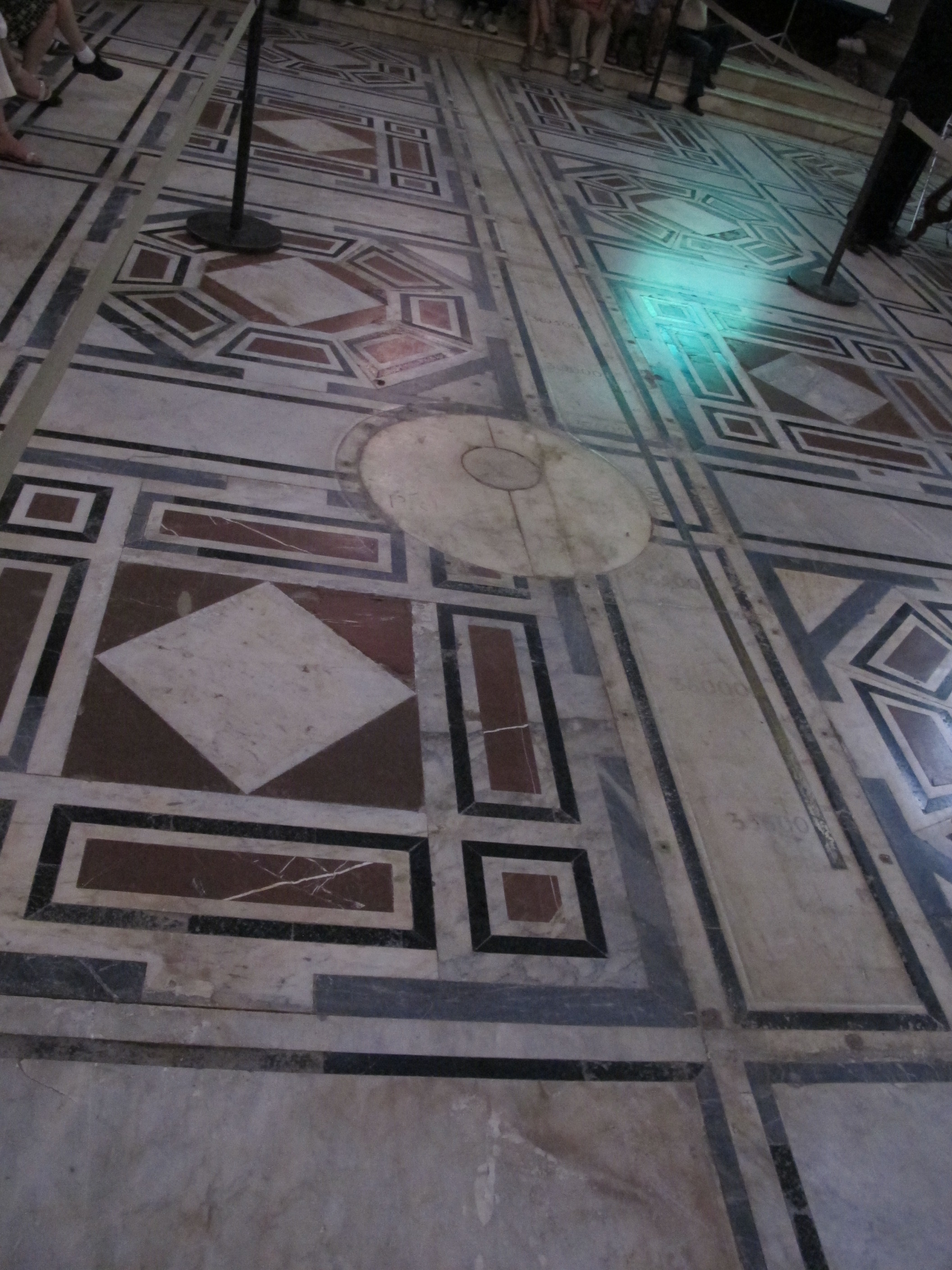 Duomo di firenze, gnomone